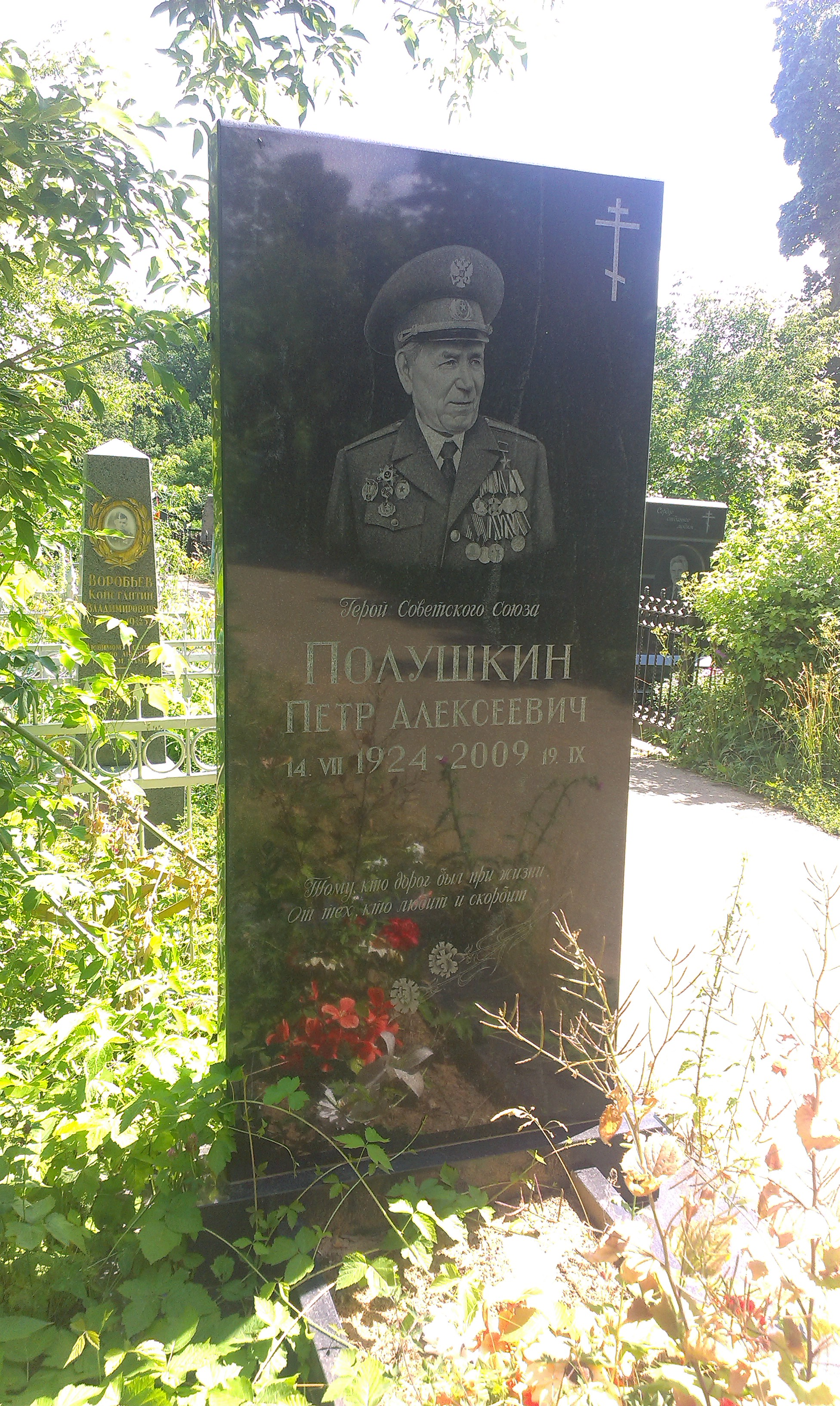 Арское кладбище